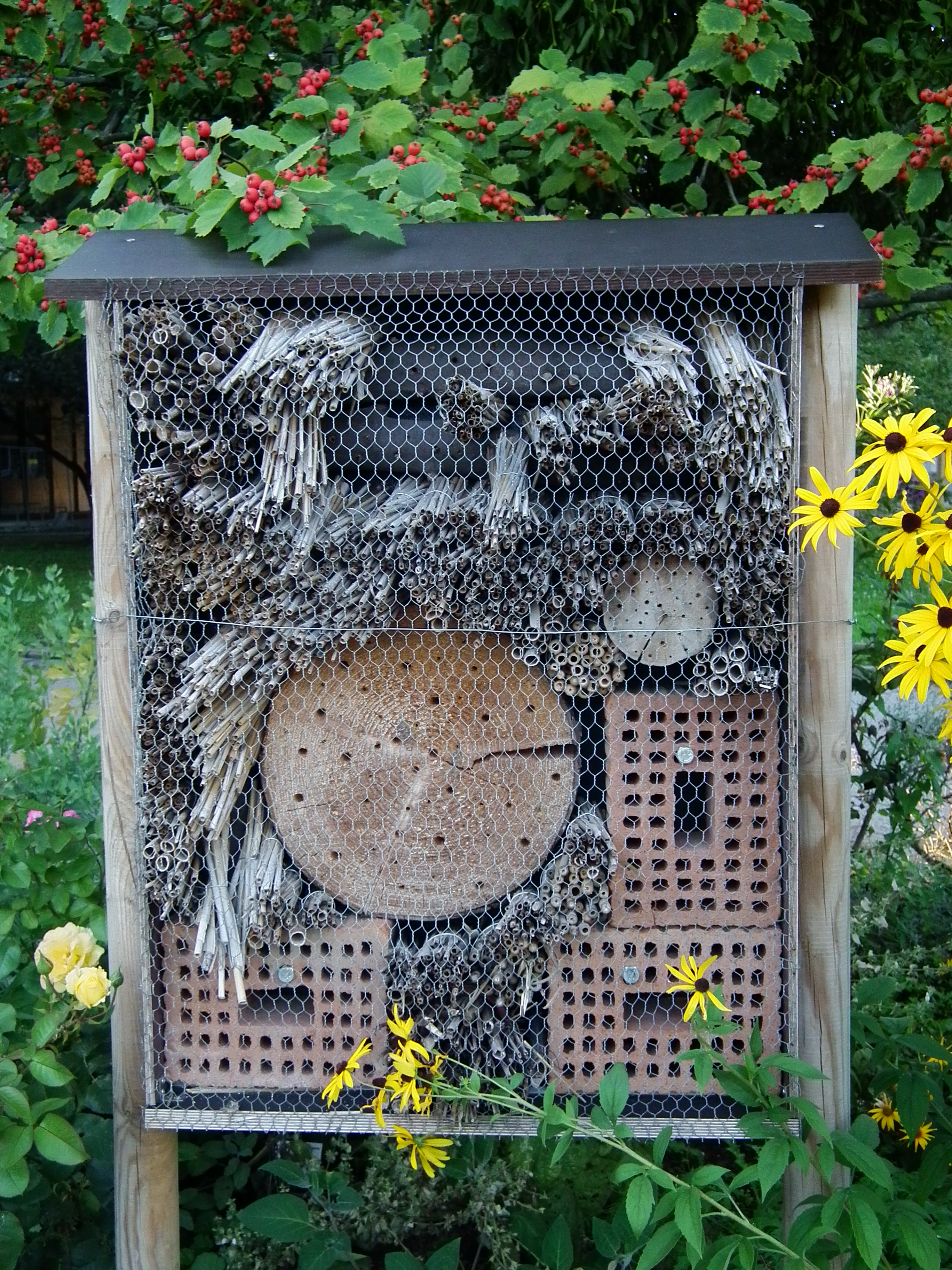 Insektenhotel auf dem Gelände des Botanischen Gartens in Heidelberg (Baden-Württemberg, Deutschland)